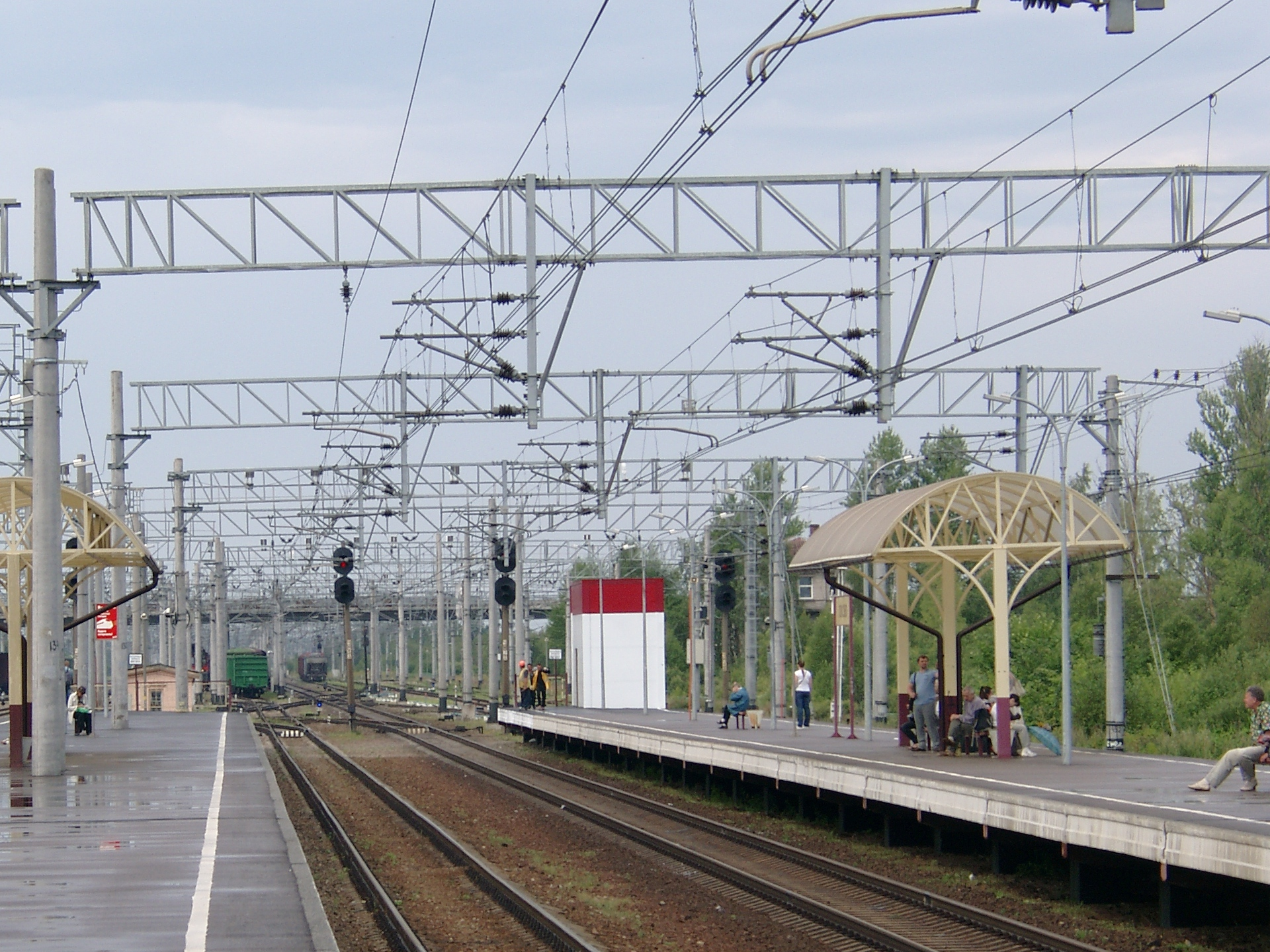 Железнодорожная станция Тосно, Ленинградская область, Россия. Вид в северо-западном направлении, в сторону платформы Тосно-2.